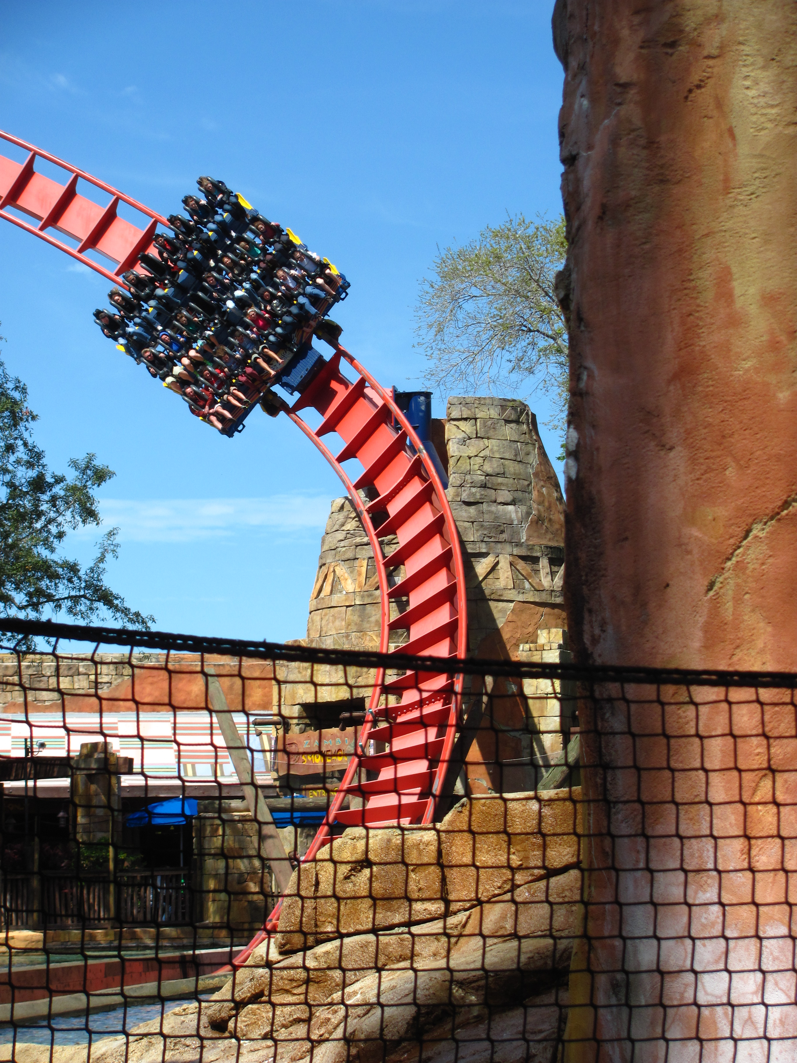 SheiKra